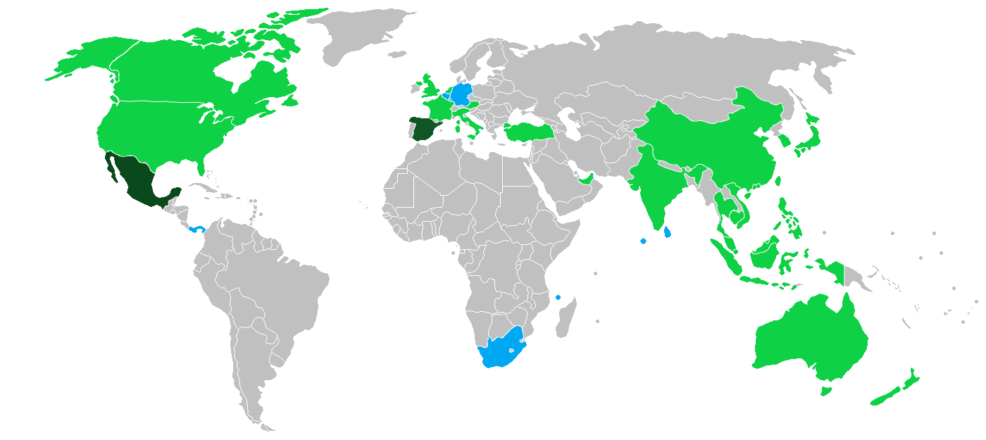 中文（台灣）: 長榮航空航點